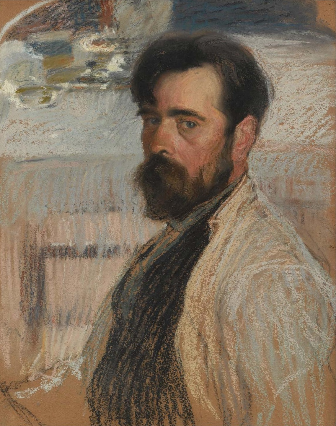 Self-portrait